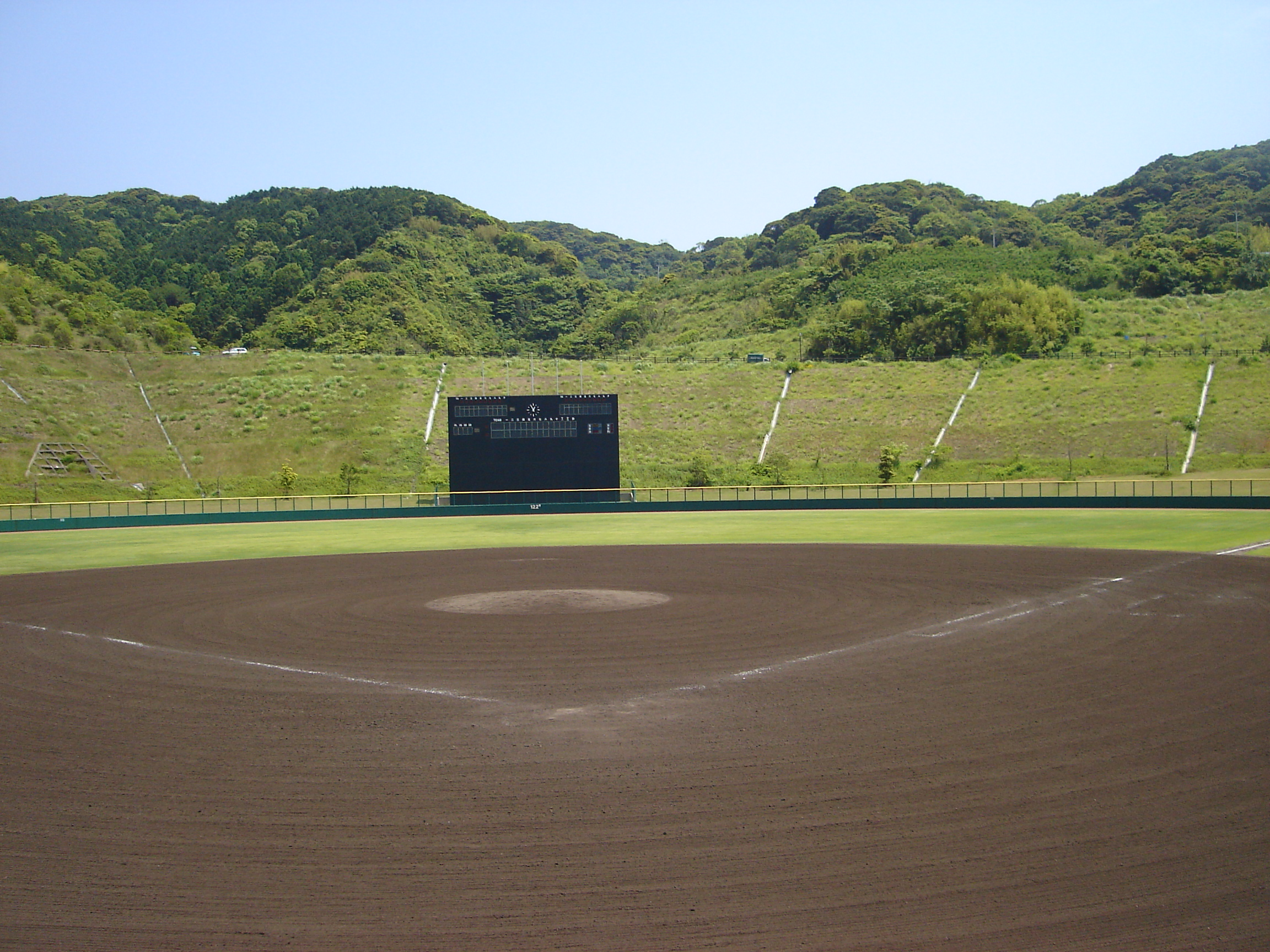 室戸広域公園野球場。 - 日本国高知県室戸市にある野球場。